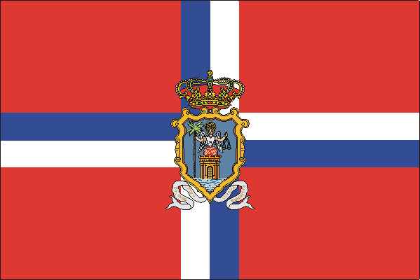 Bandera de Santa Cruz de La Palma